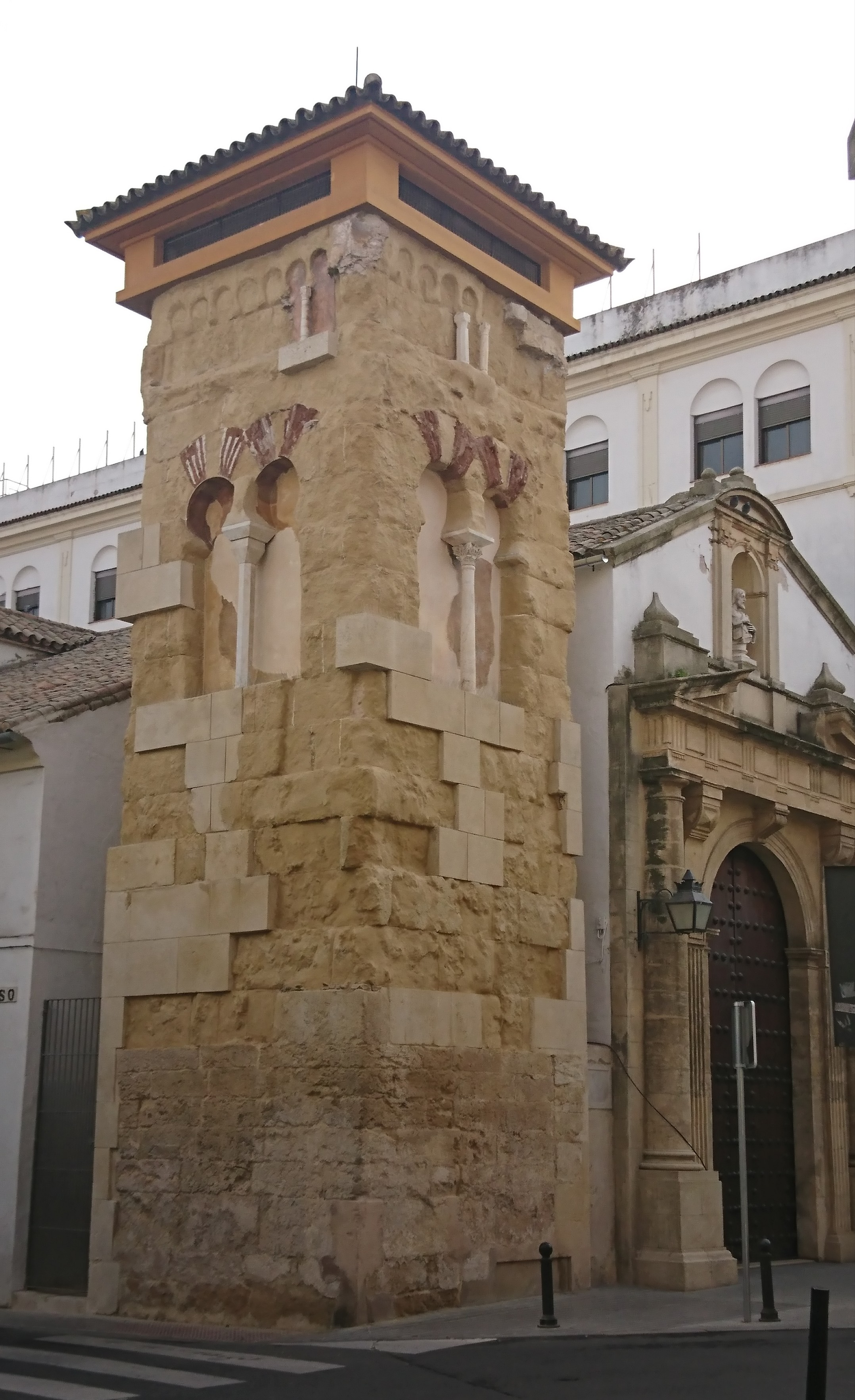 Alminar tras la restauración